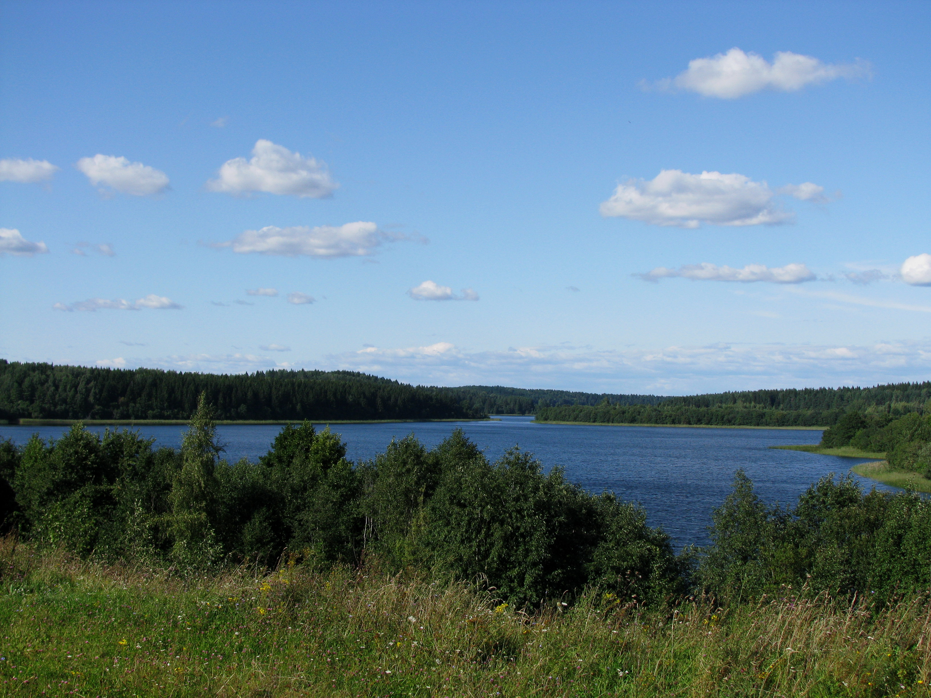 озеро Кривое